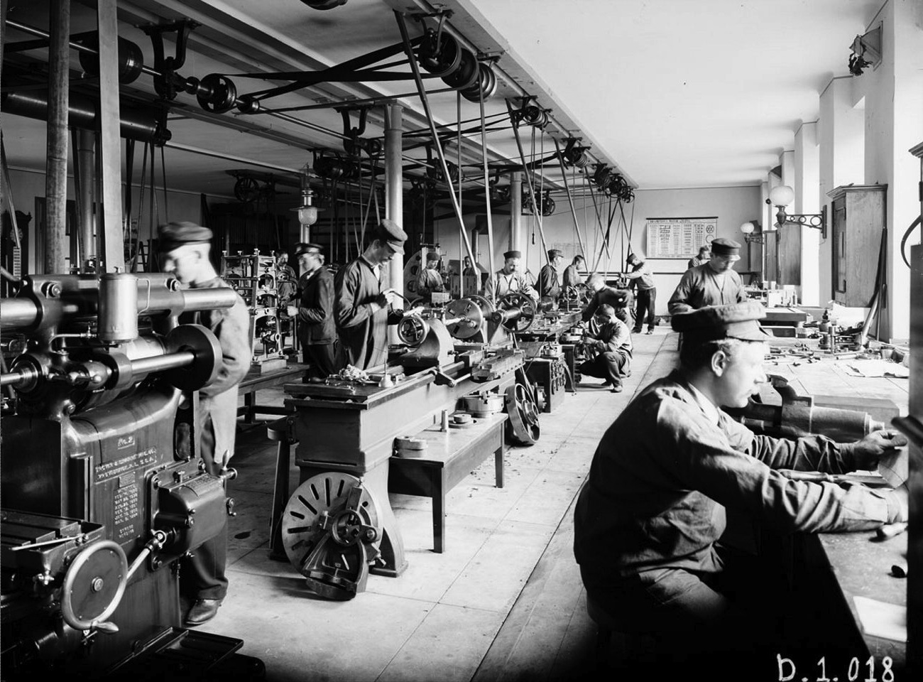 Interiör från Gustaf LM Ericssons Automobilfabrik, Arbetaregatan 4 (nuvarande Arbetargatan 32-34, kvarteret Ankaret), Kungsholmen, Stockholm.